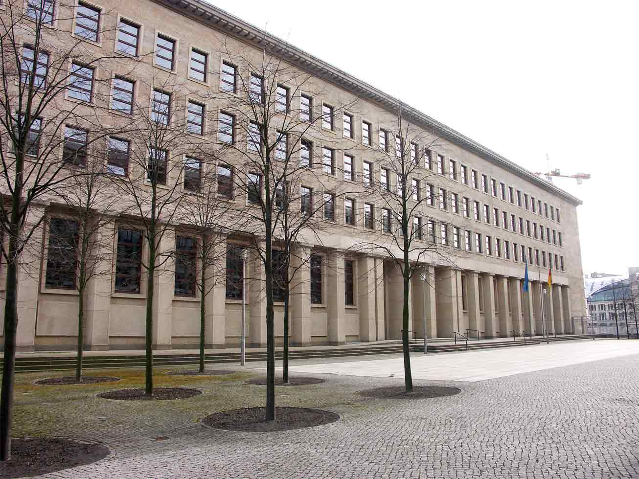 ehemaliges Gebäude des Zentralkomitee der SED, 1940 als neue Reichsbank erbaut, ab 1959 Sitz des ZK/ Politbüros der SED, sog. "Großes Haus", ab 1999 Teil des Auswärtigen Amtes der Bundesrepublik, Platz nicht öffentlich zugänglich; Berlin-Mitte, Werderscher Markt; eigenes Foto 15-04-2006 Bettenburg